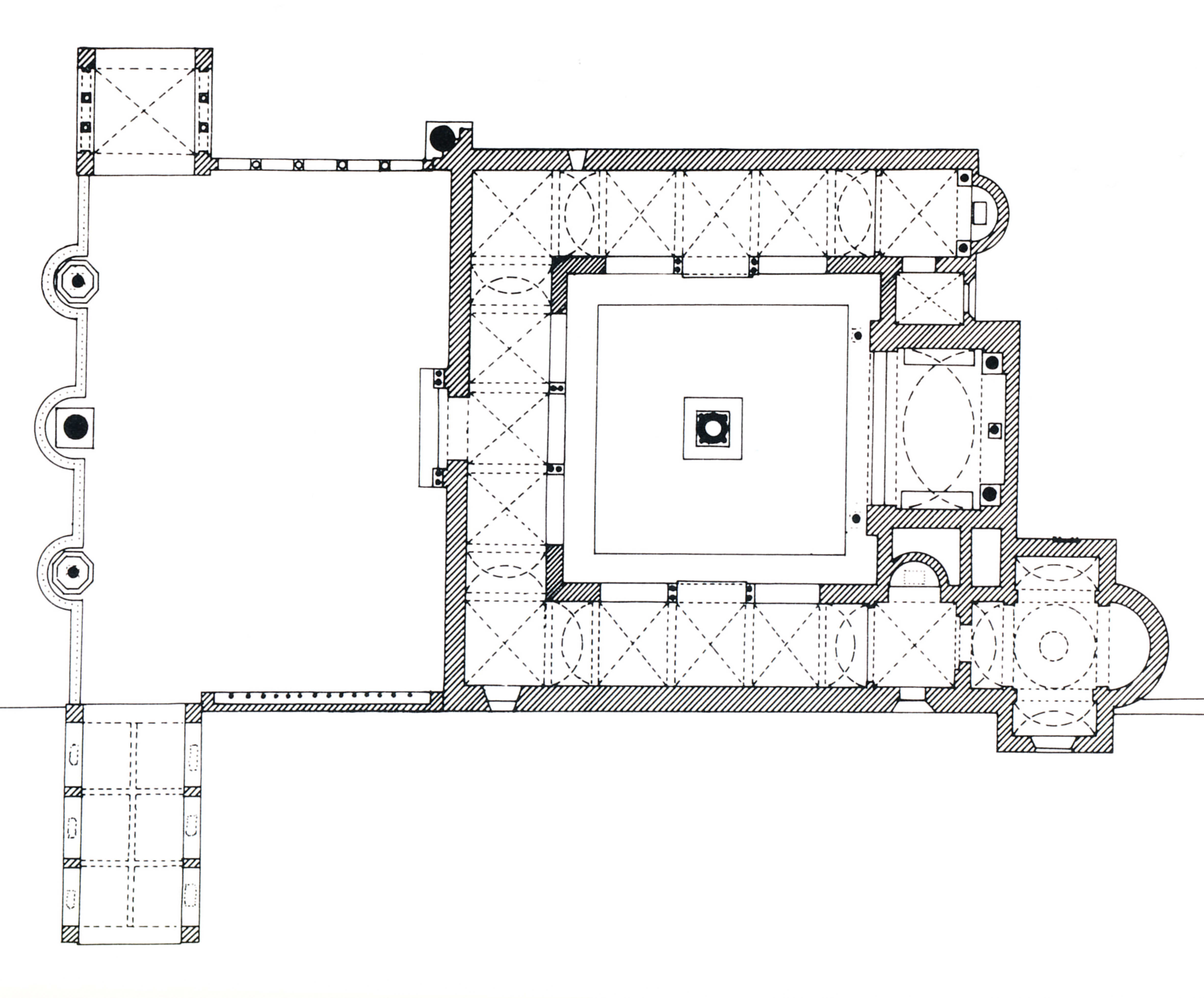 Grundriss des Klosterhofs Klein-Glienicke, Umzeichnung bestehender Pläne 1987